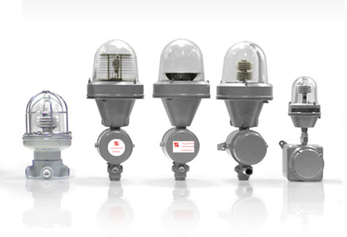 Esempio di lampade di segnalazione ostacoli a volo con meccanica antideflagrante